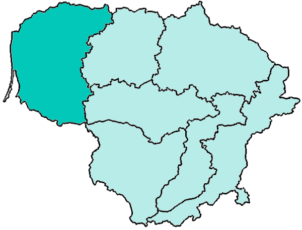 Mappa della diocesi cattolica di Telšiai, in Lituania.